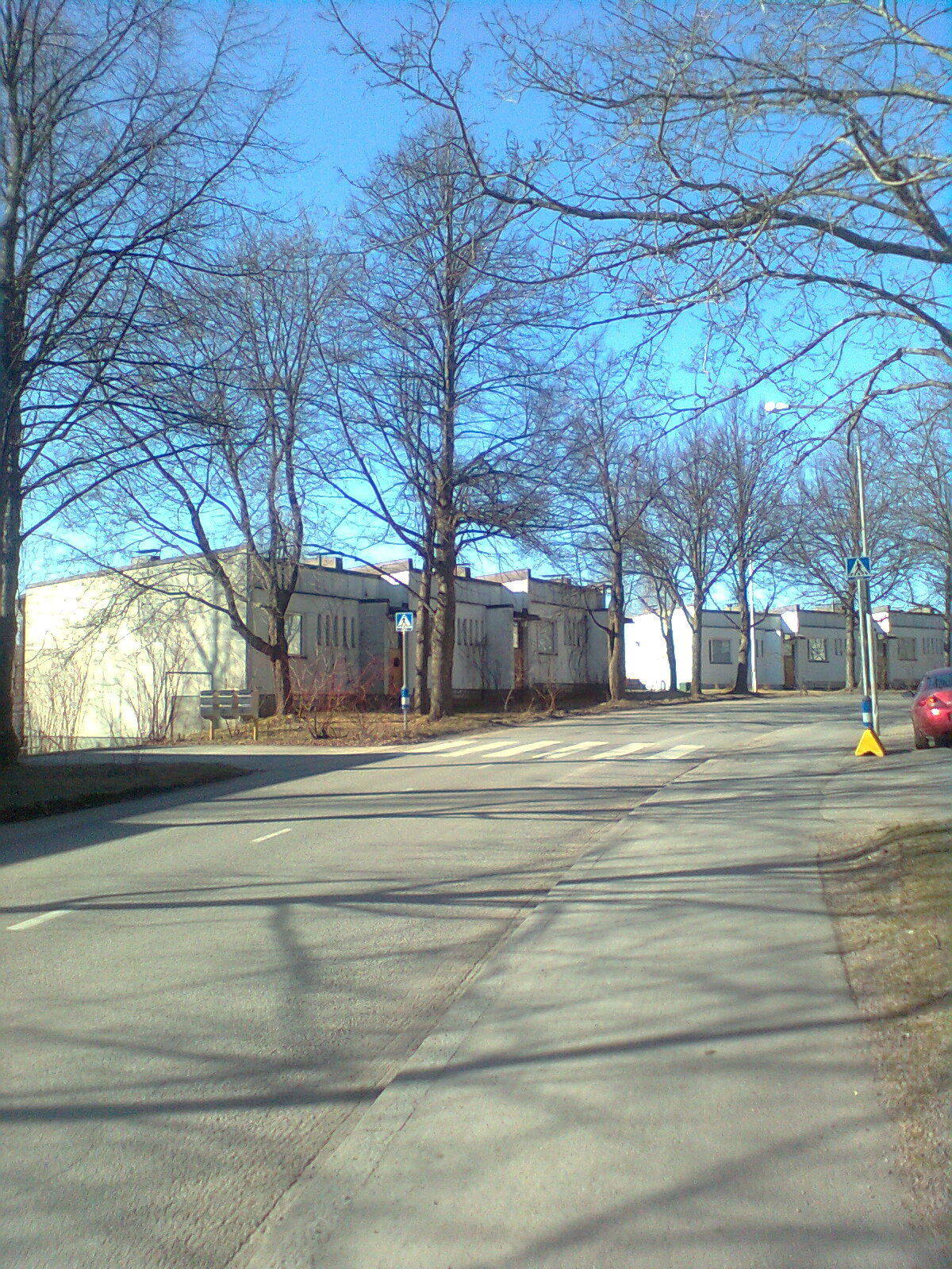 Viitaniementie Jyväskylässä keväällä 2011.